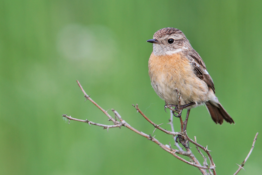 Schwarzkehlchen in der Nähe des Ilkerbruchs